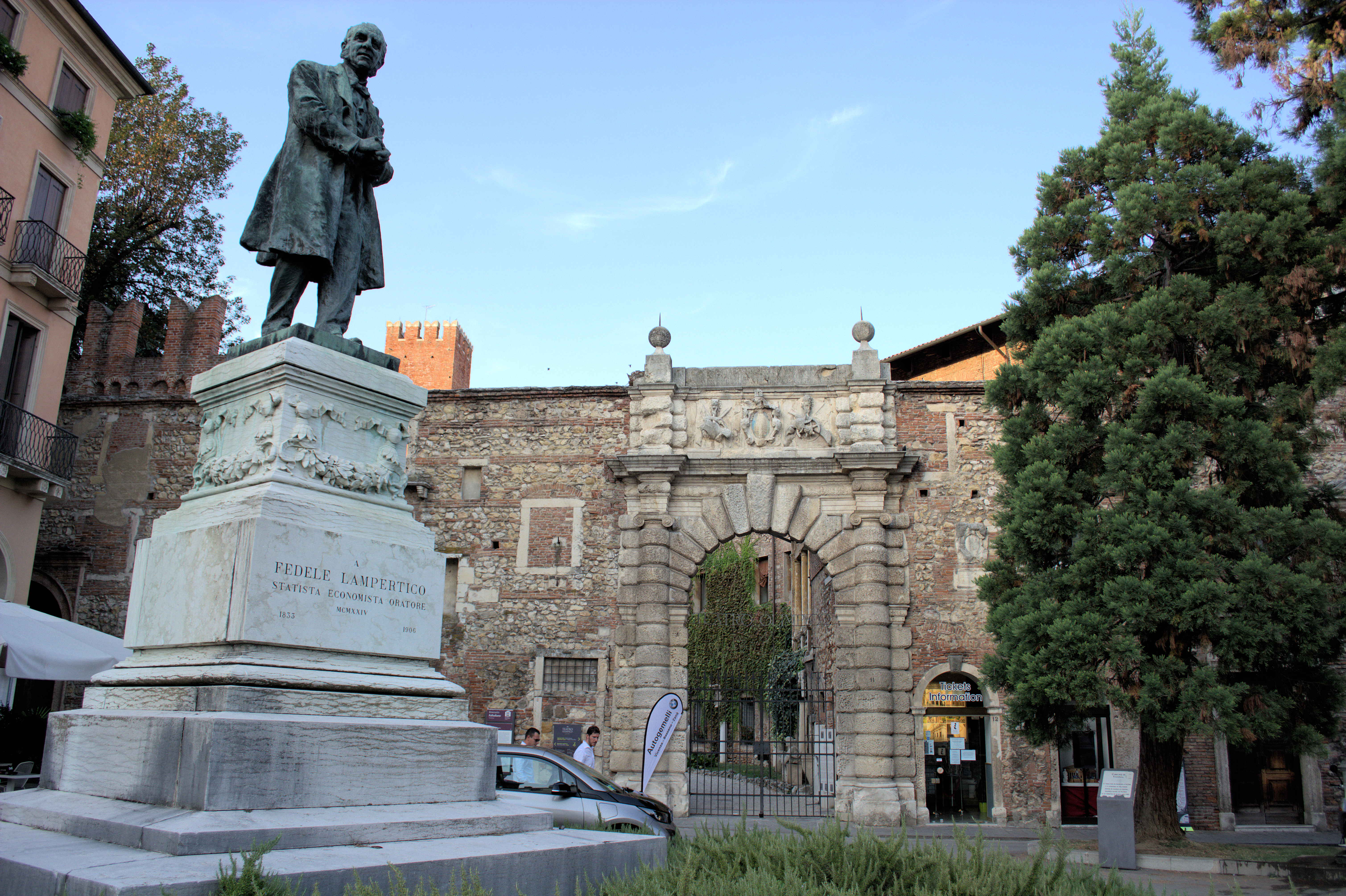 Teatro Olimpico This is a photo of a monument which is part of cultural heritage of Italy.